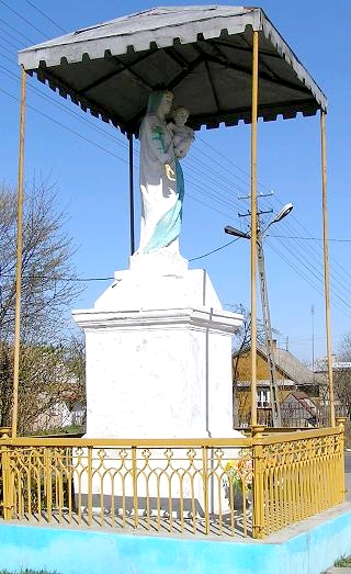 Stróża-Kolonia - kapliczka